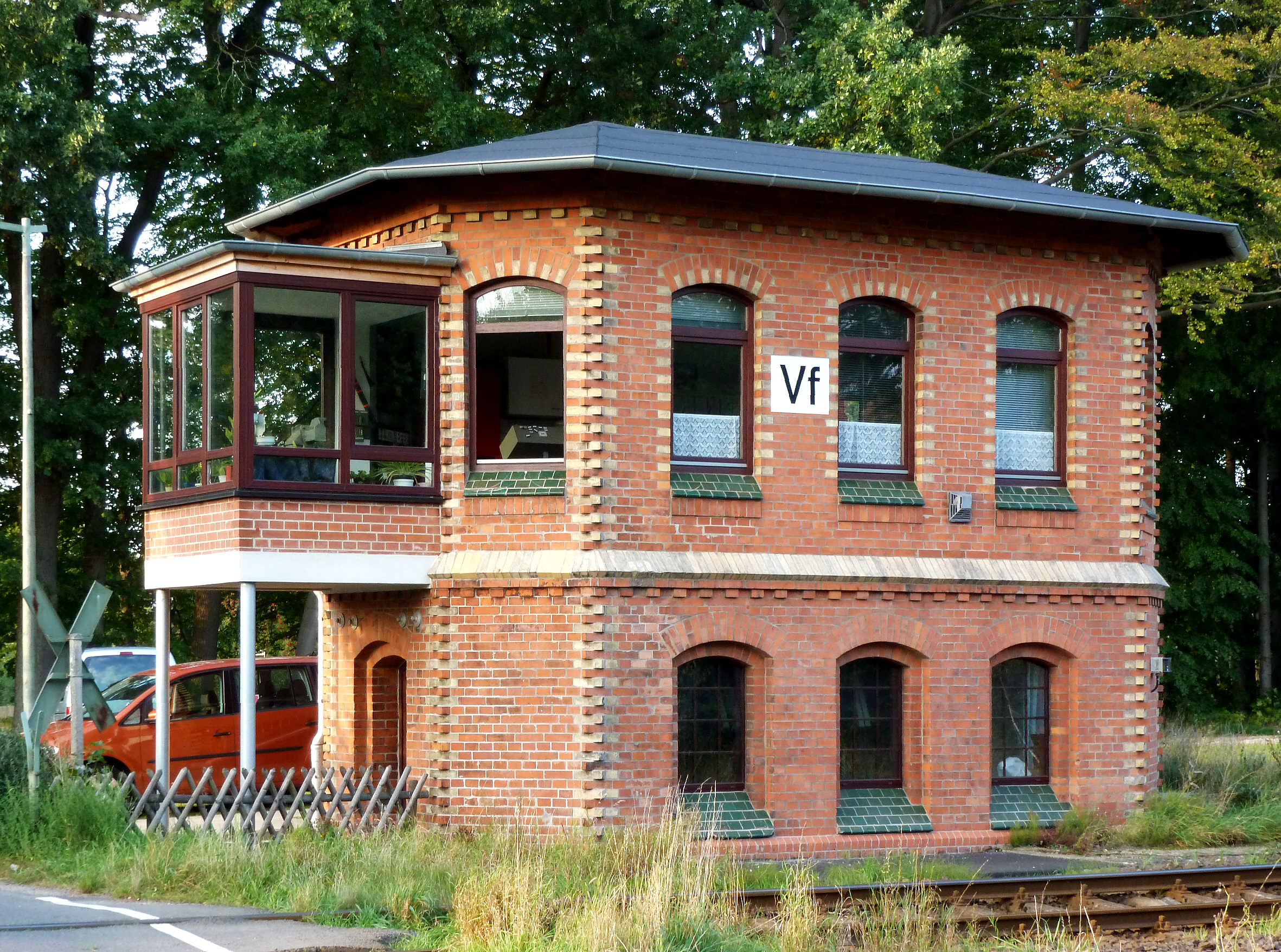 Stellwerk in Visselhövede, Niedersachsen, DE. Gebäude erbaut in 1902.